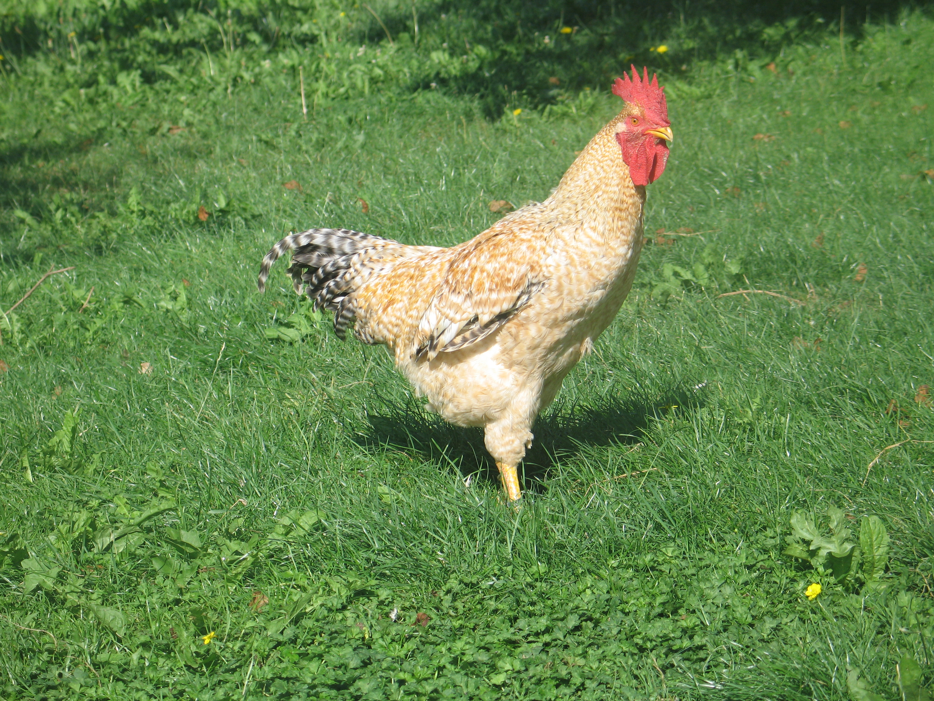 Euskal oiloa. Barietate marraduna, oilarra